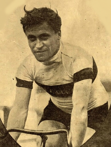 Il ciclista Alfonso Calzolari Tratto da "Domenica Sportiva" n.5, 1918 [1] pubblico dominio